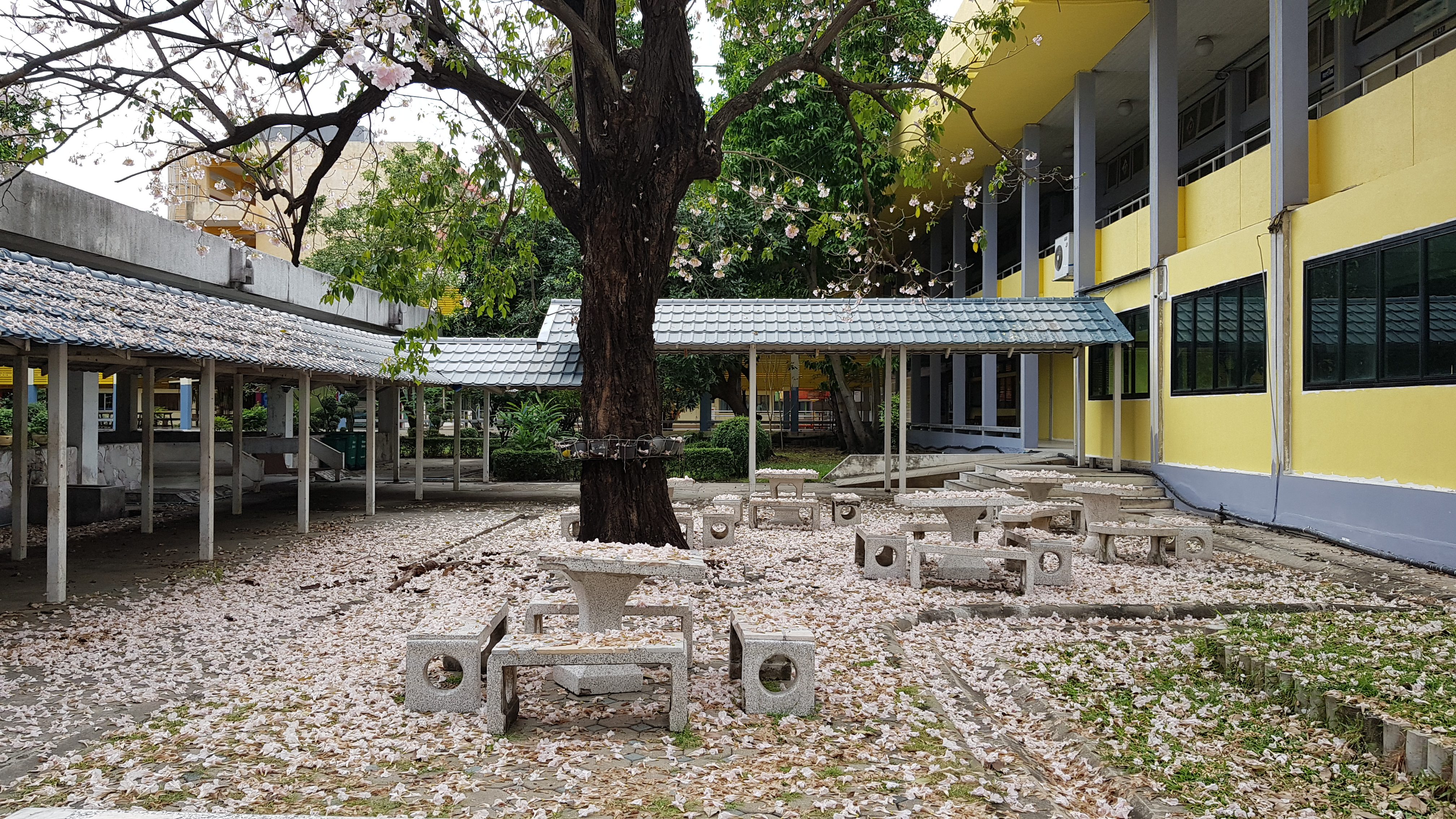 ดอกต้นชมพูพันธุ์ทิพย์ที่บานและร่วงหล่นในช่วงปลายปี